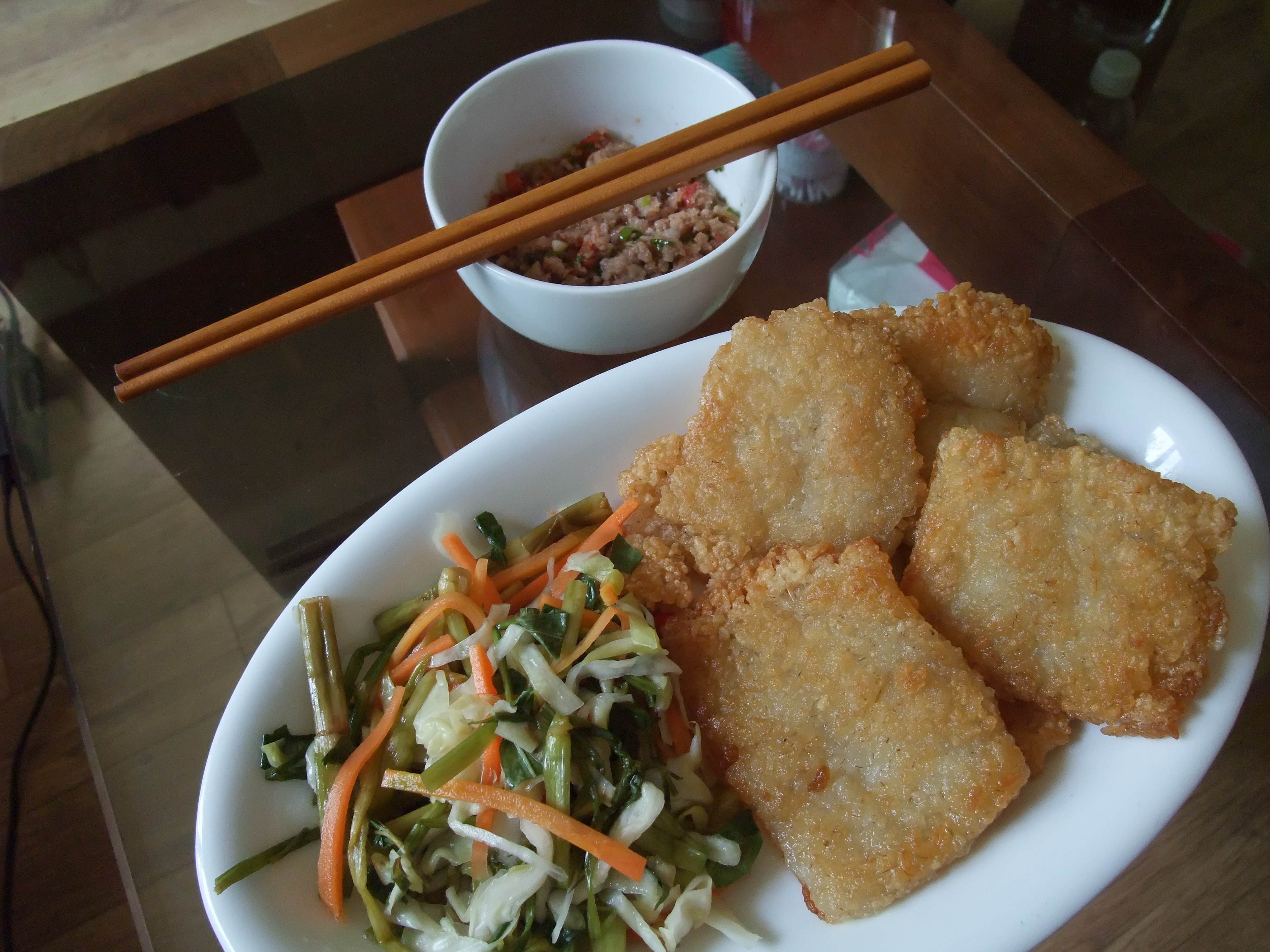 Xôi chiên ăn kèm với thịt sốt, dưa bắp cải rau cần muối xổi